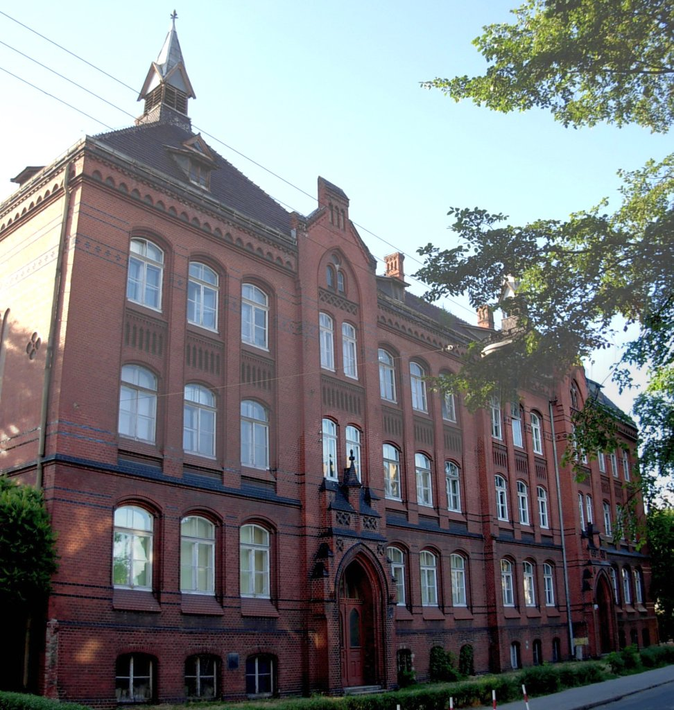 Budynek UTP w Bydgoszczy, dawniej Hippelschule, ul Kordeckiego 70-72 (Carl Meyer 1901-1902)